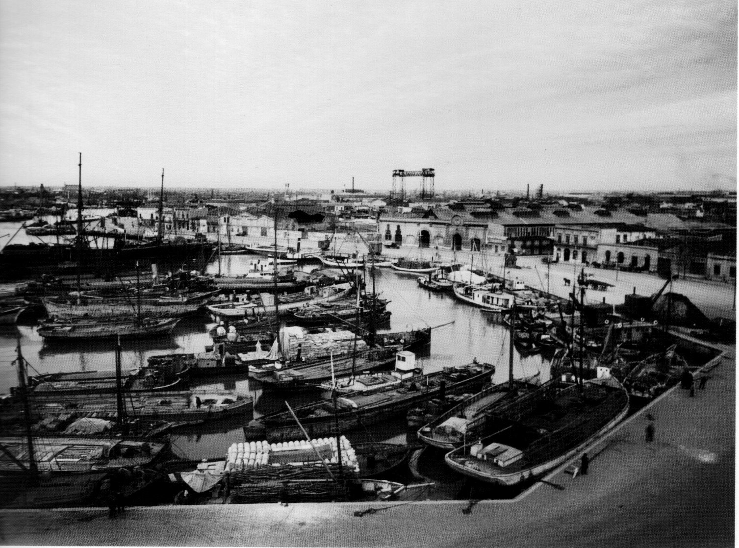 Vista de la Vuelta de Rocha del Riachuelo, Buenos Aires, en 1936. En el fondo se aprecia el Puente Transbordador Presidente Saénz Peña ubicado en correspondencia con la calle Garibaldi, que fue desmontado en la década de 1960.